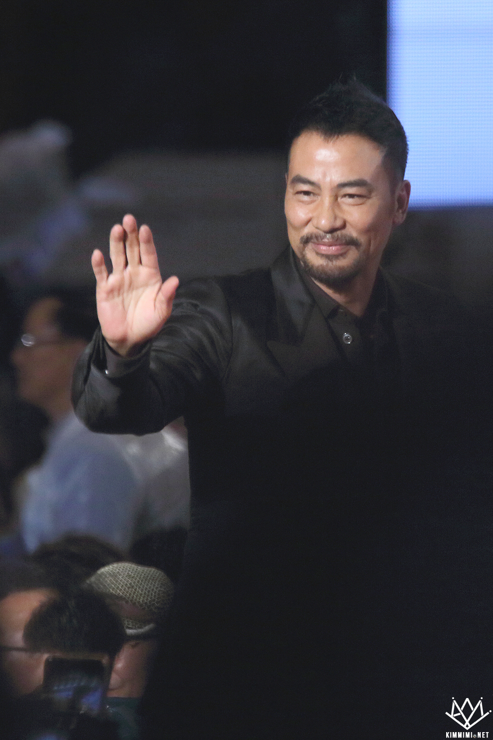 151001 부산국제영화제 개막식 레드카펫